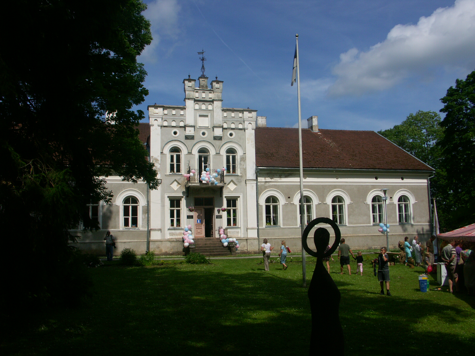 Illuka mõisa peahoone, 1888